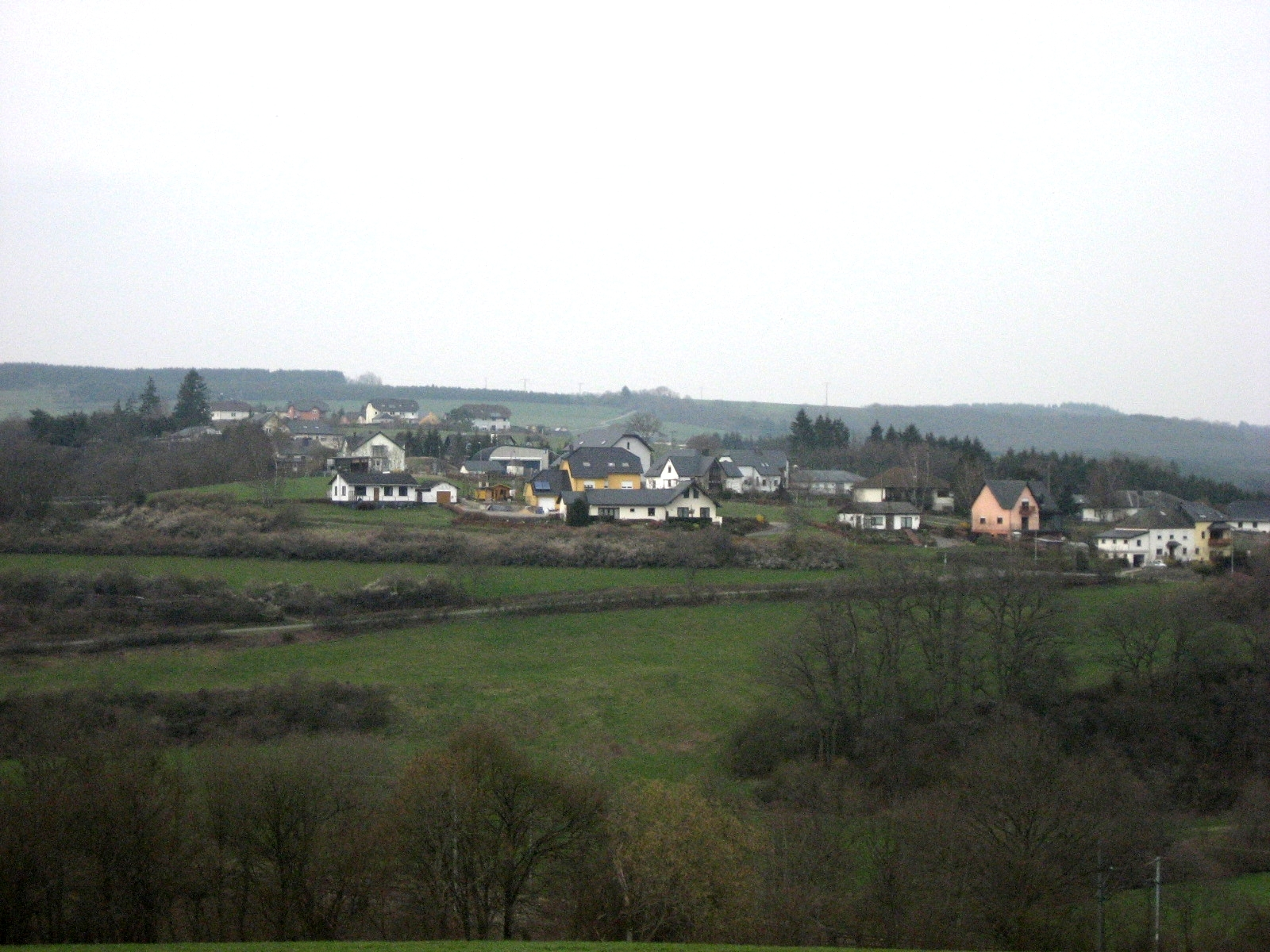 D'Ierwescht Duerf vu Lellgen, Abrëll 2012